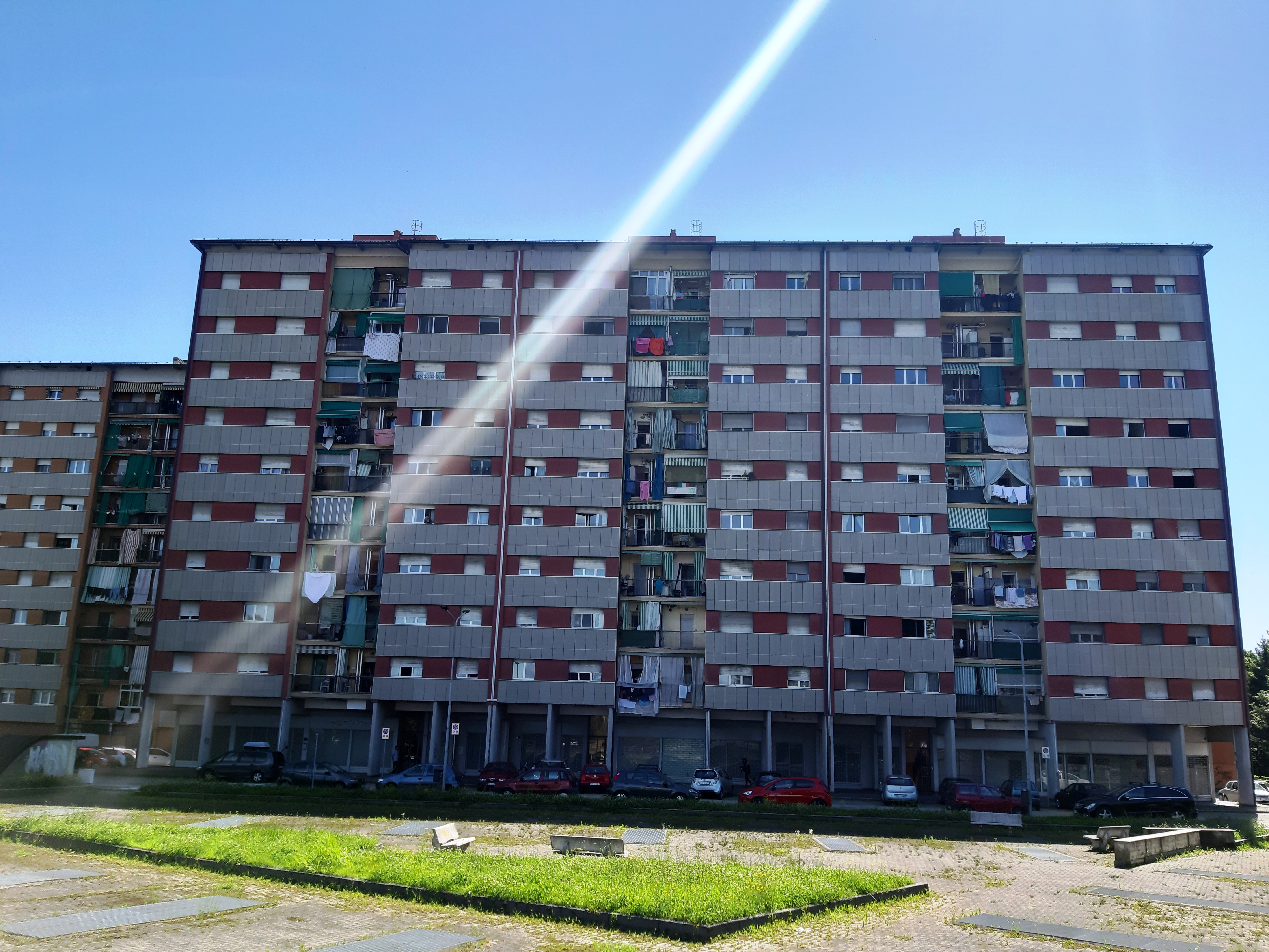 Esempio di case popolari a Nichelino